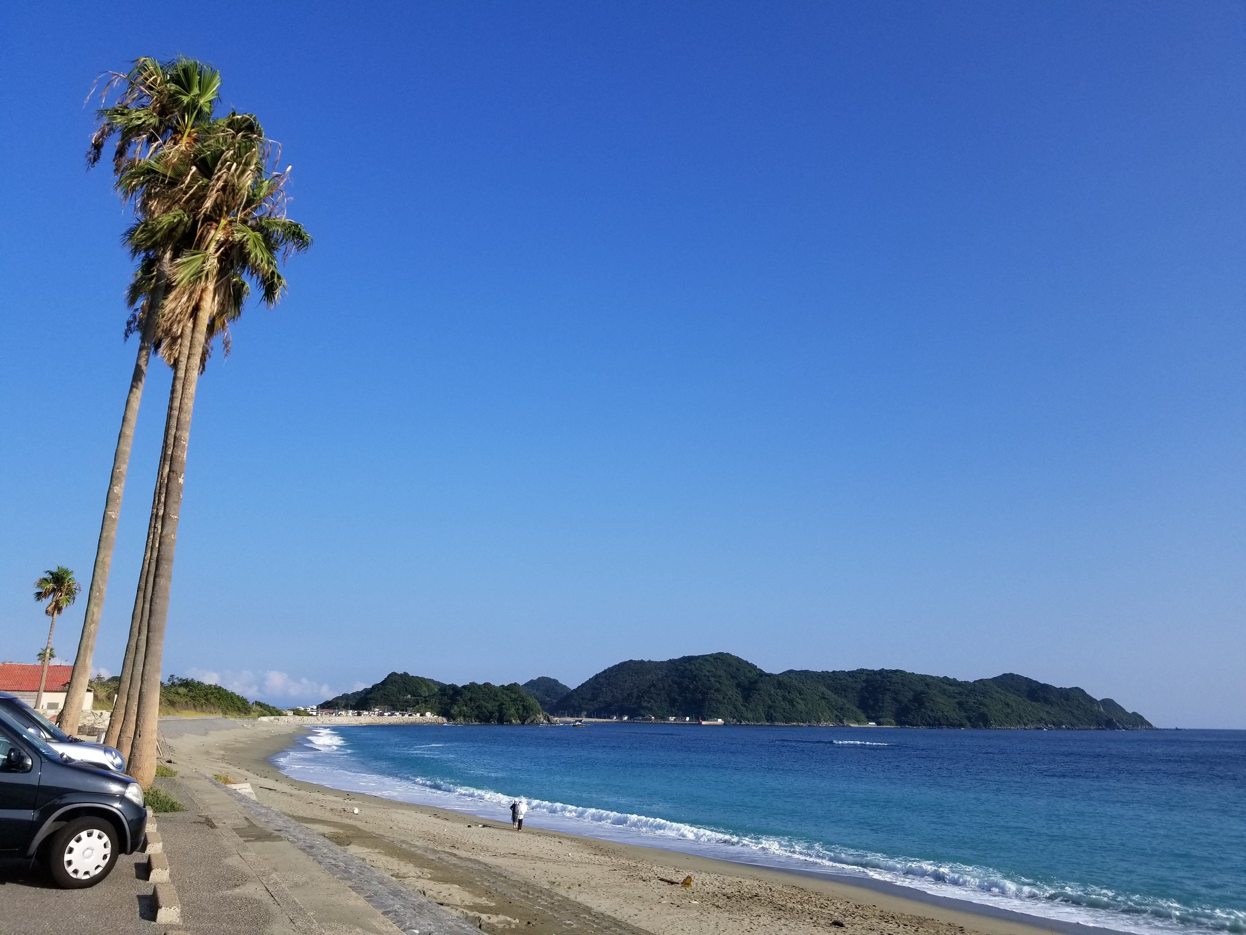 脇岬海水浴場（長崎県長崎市）